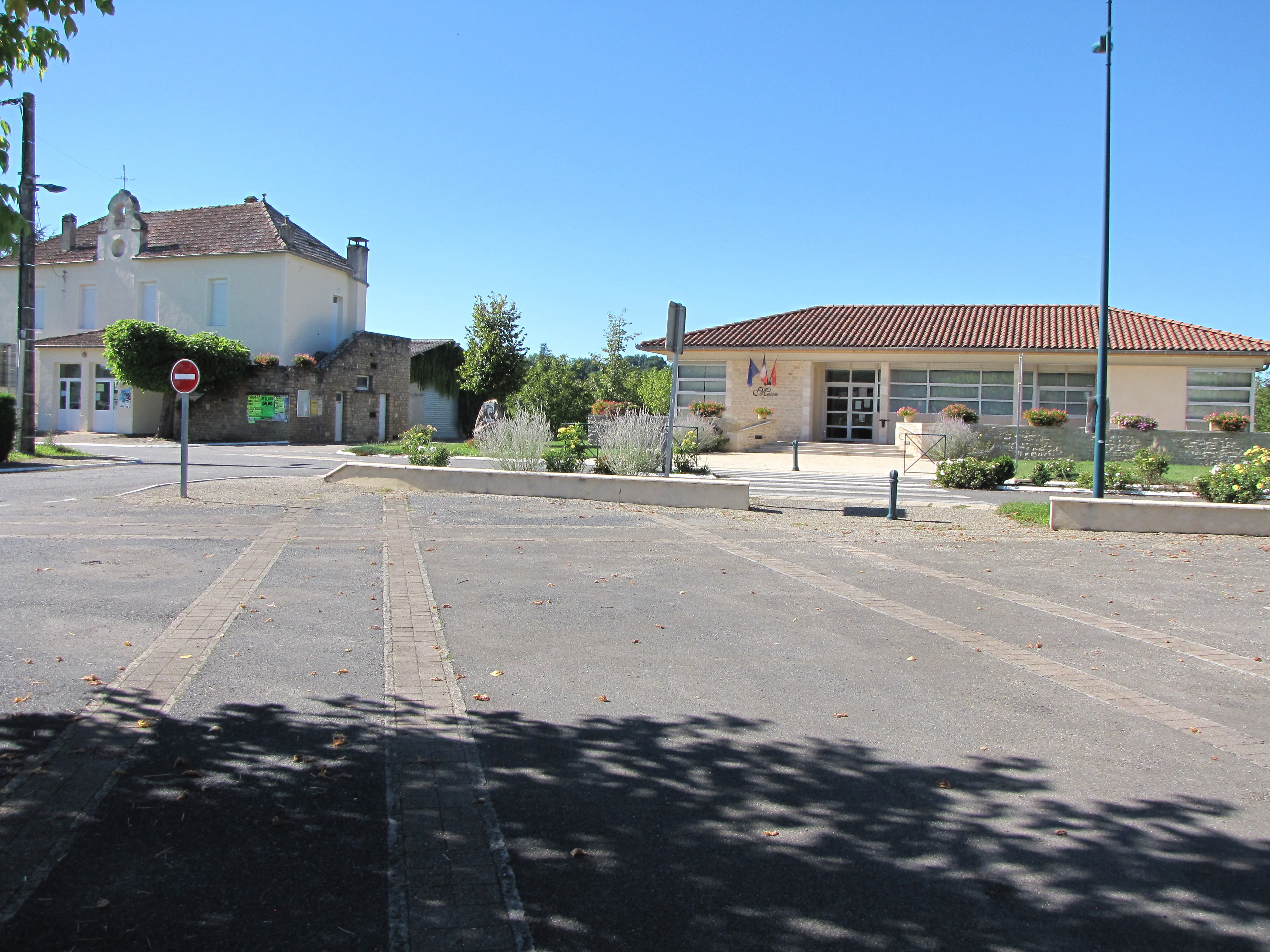 Mairie d'Anglars-Juillac